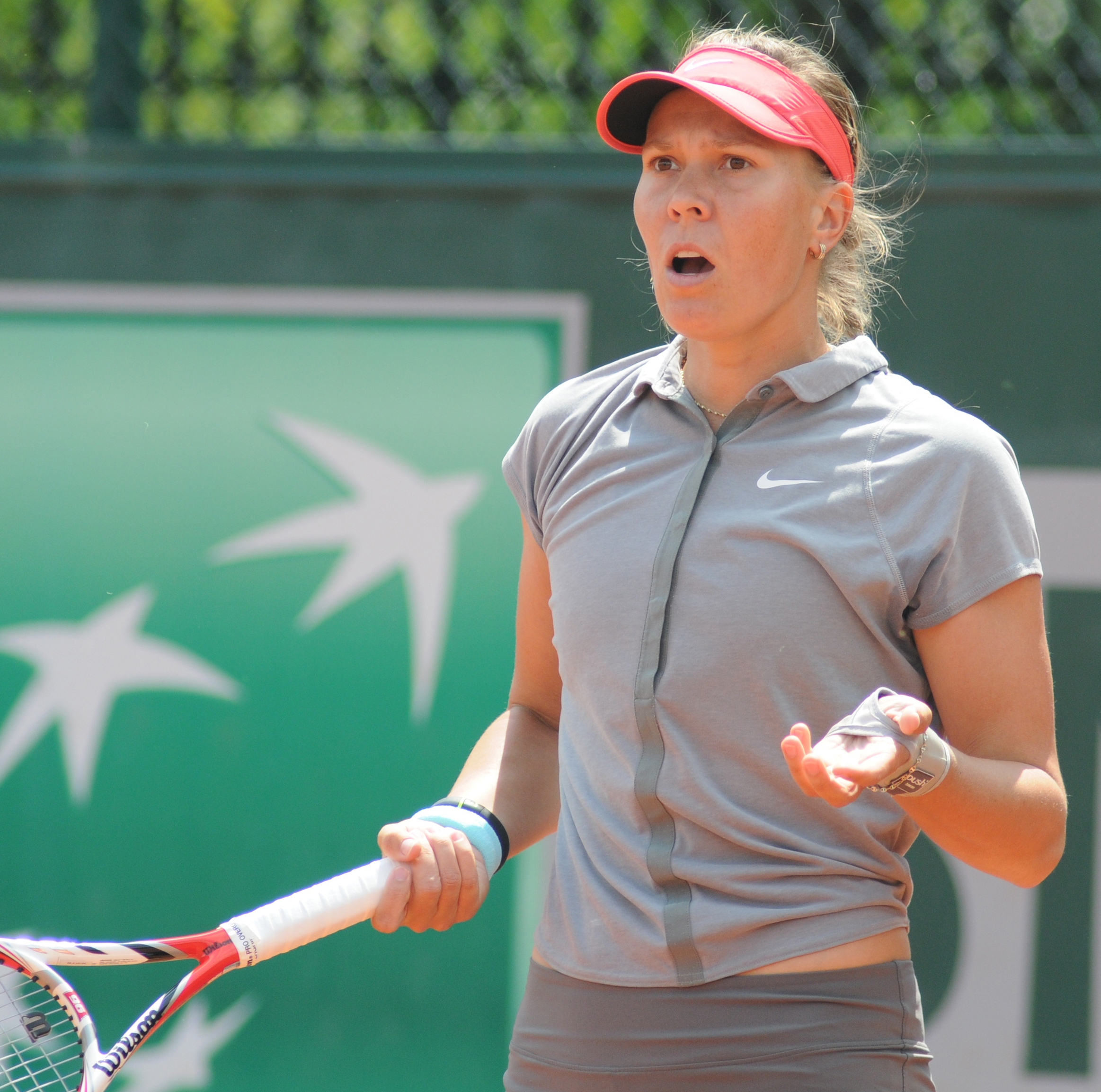 Lucie Hradecka